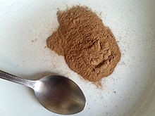 קליפת איבוגה טחונה